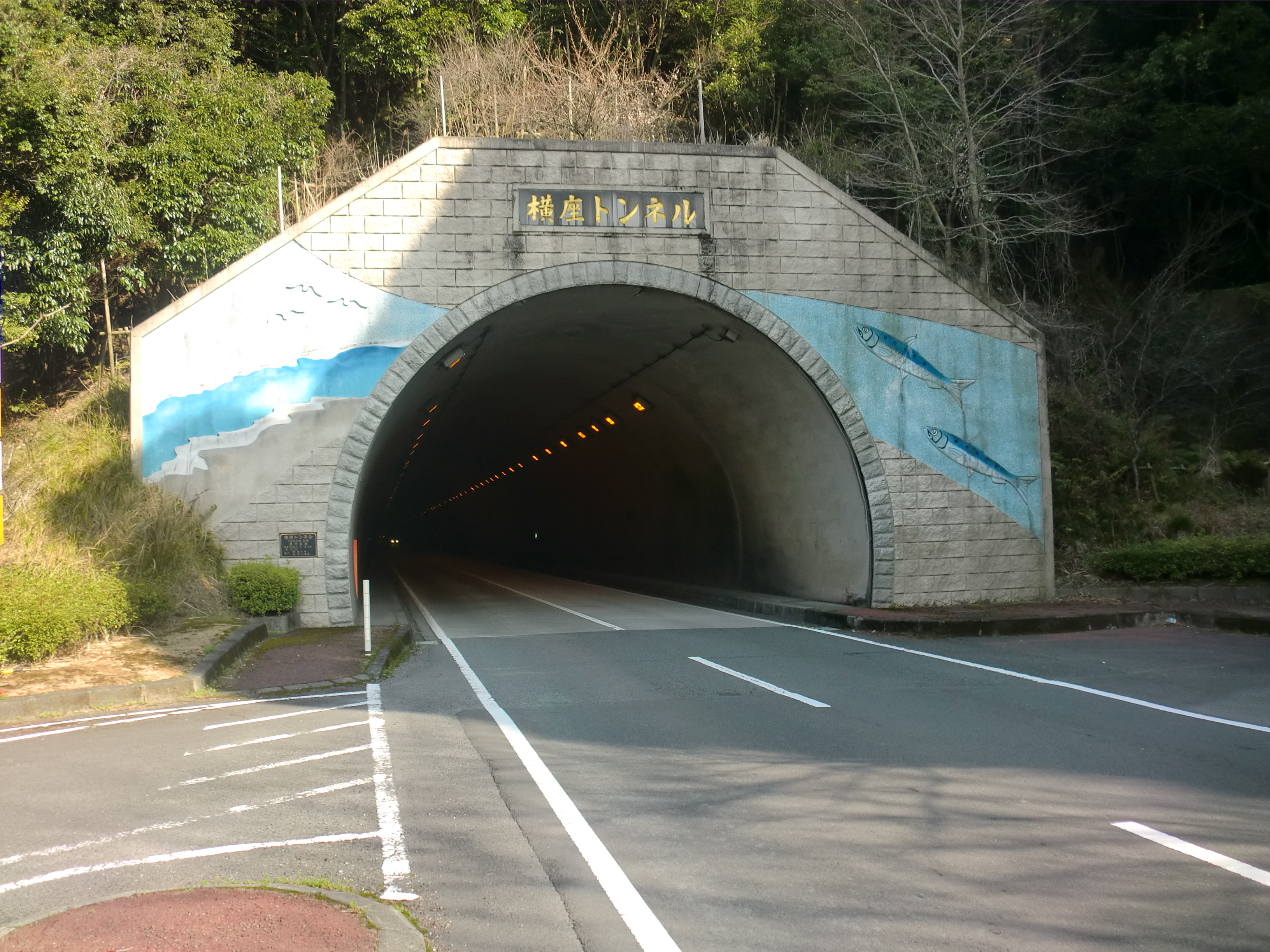 鹿児島県道46号阿久根東郷線横座（よこざ）トンネル。薩摩川内市側。